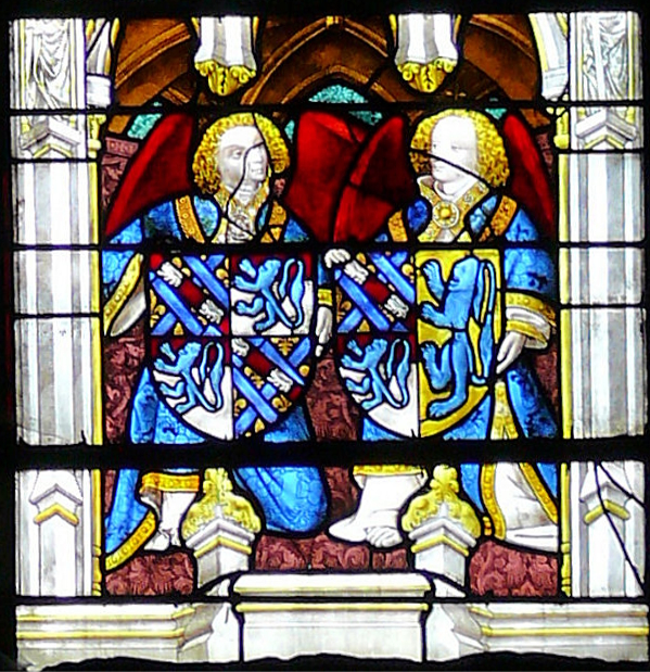 Armes de Louis de Bourbon la Marche (gauche) et Blanche de Roucy (droite)